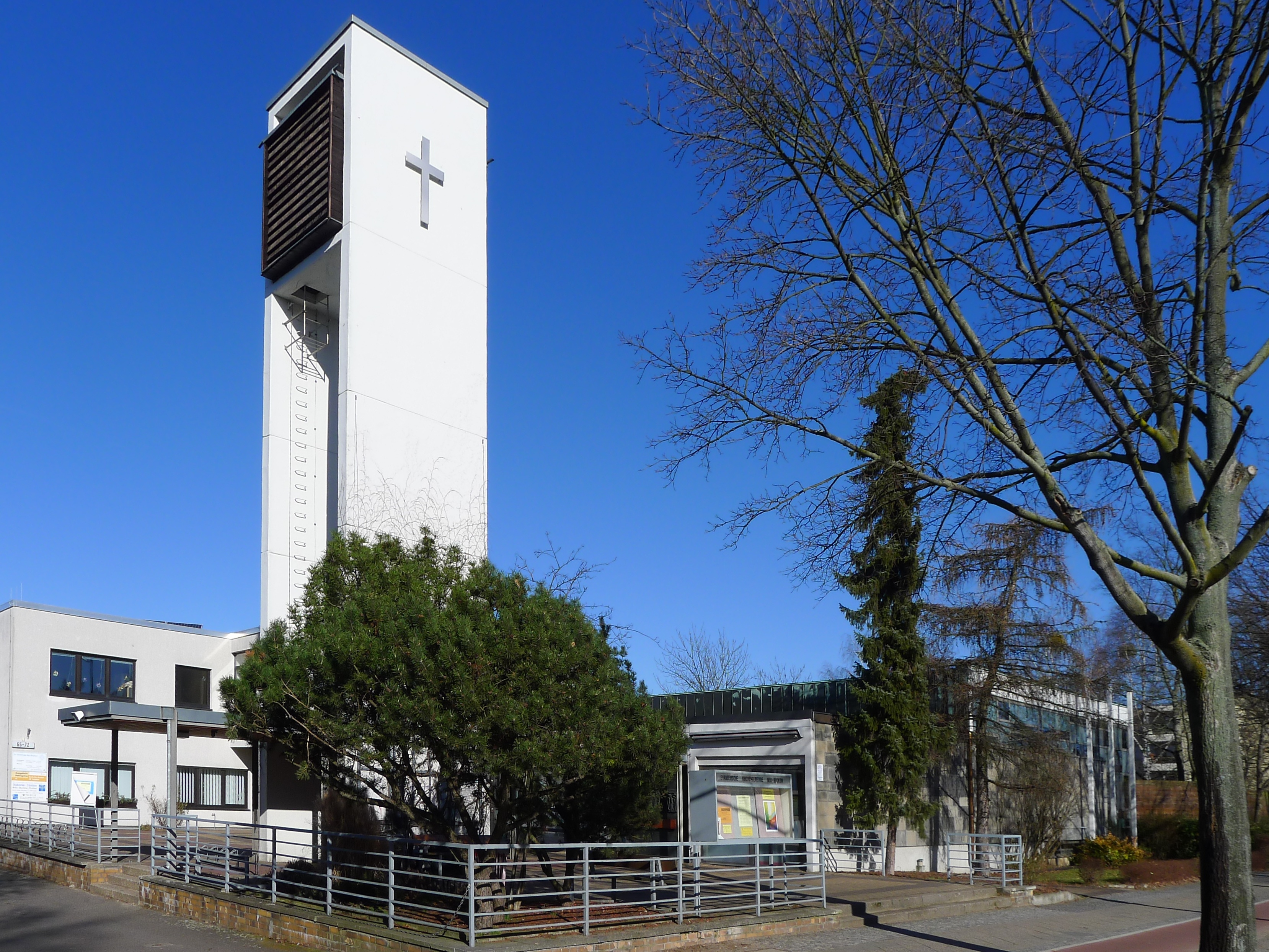 Blick auf die Kirche